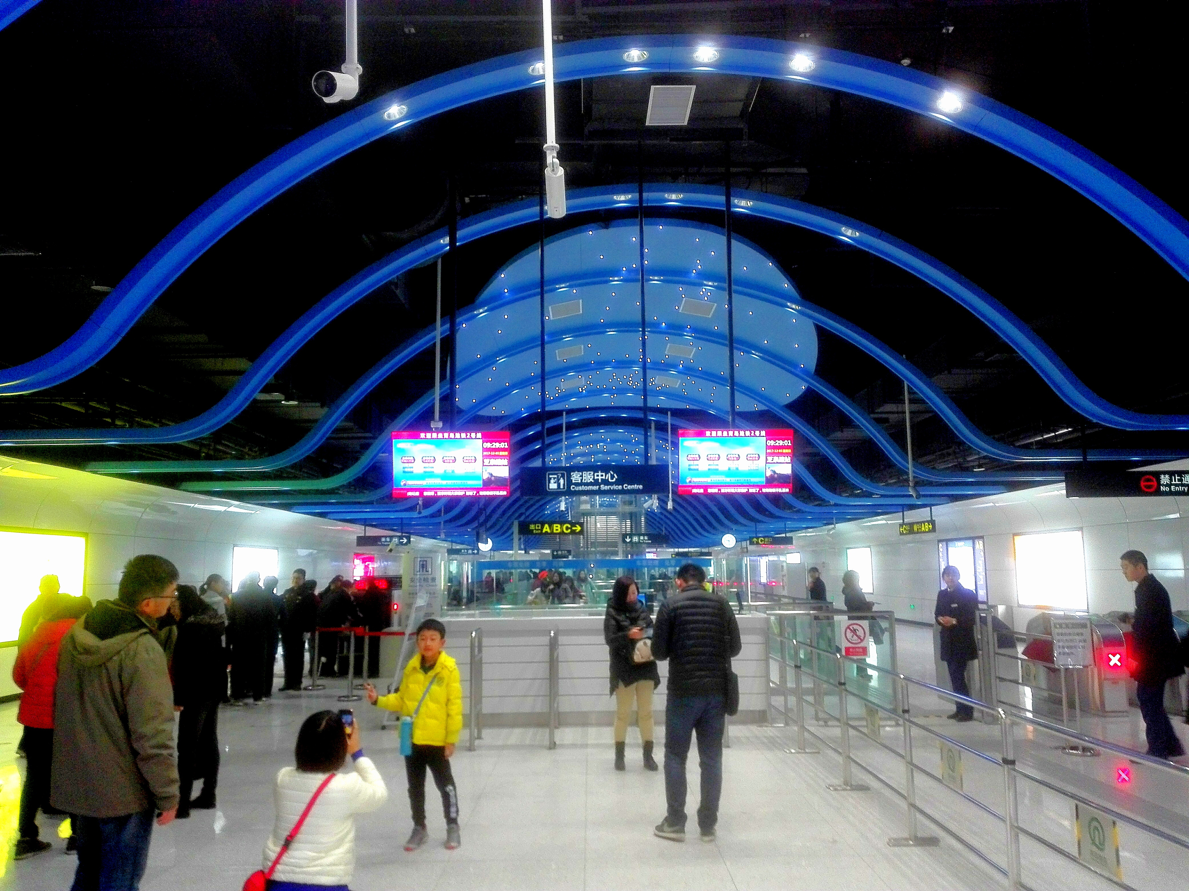 青岛地铁二号线芝泉路站内景